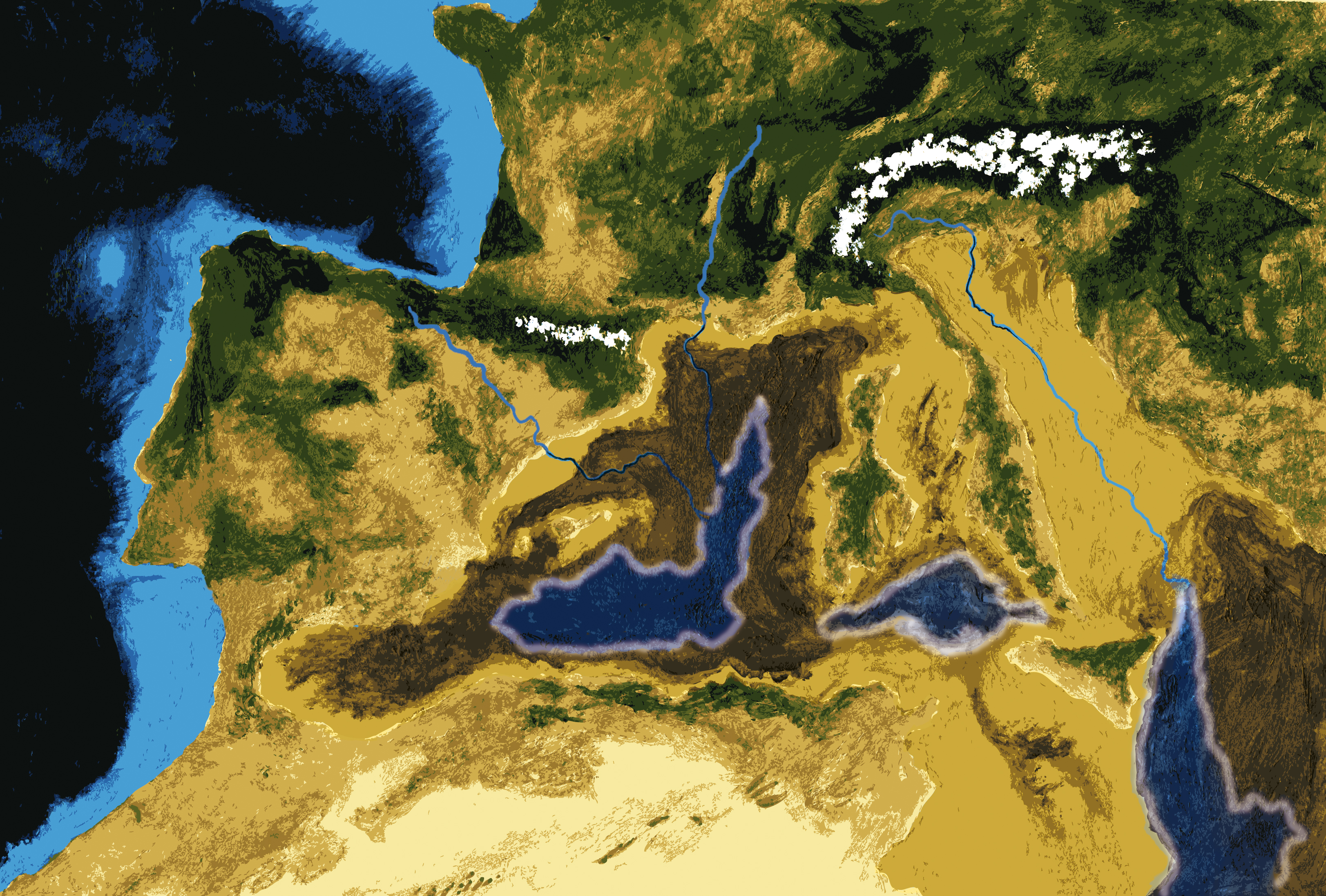 Aixecament total de l'estret i dessecació del Mediterrani